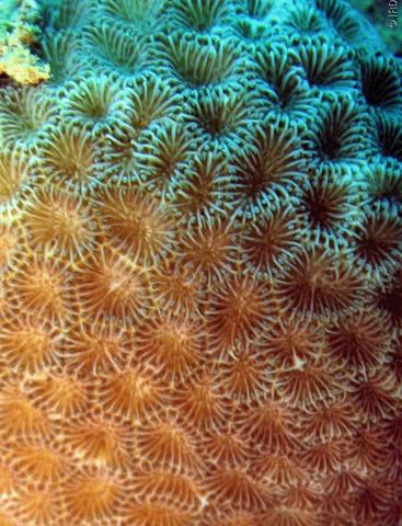 Coeloseris mayeri, primer plano colonia